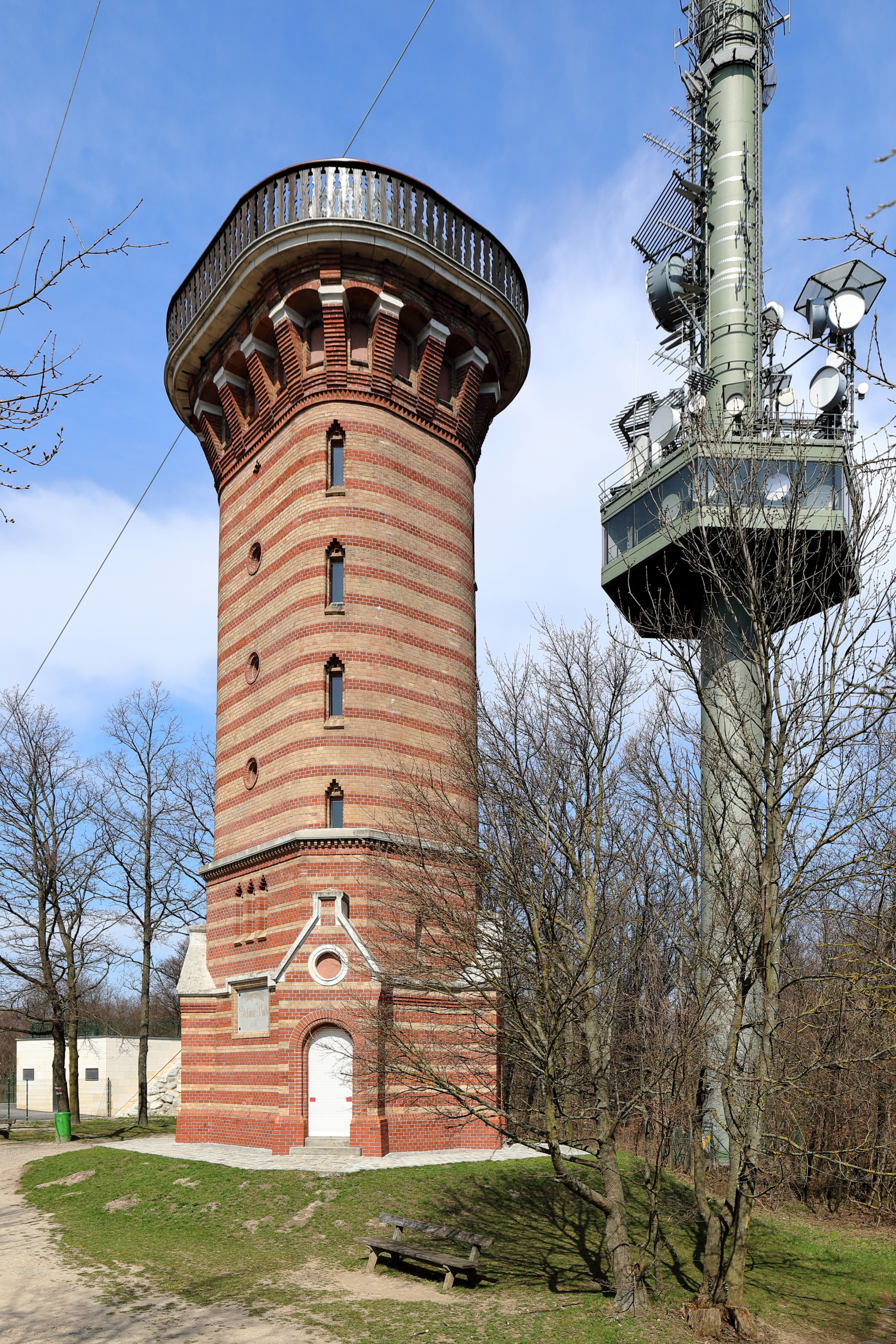 Südostansicht der Stephaniewarte am 484 Metern hohen Gipfel des Kahlenberges im 19. Wiener Gemeindebezirk Döbling, rechts davon der 1974 errichtete 165 Meter hohe Senderturm und links ein 2016/17 erneuerter und von 135 auf 400 m³ vergrößerter Wasserbehälter. Die 22 Meter hohe Aussichtswarte wurde nach Plänen des Architektenbüros Fellner & Helmer im Auftrag der Kahlenberg-Eisenbahn-Gesellschaft an der Endstation der Kahlenbergbahn errichtet und am 29. Mai 1887 unter der Bezeichnung „Kronprinzessin Stephanie-Warte“ eröffnet. Aktuell (2018) wird sie vom Touristenverein „Die Naturfreunde" betreut und ist in den Sommermonaten am Wochenende zugänglich.